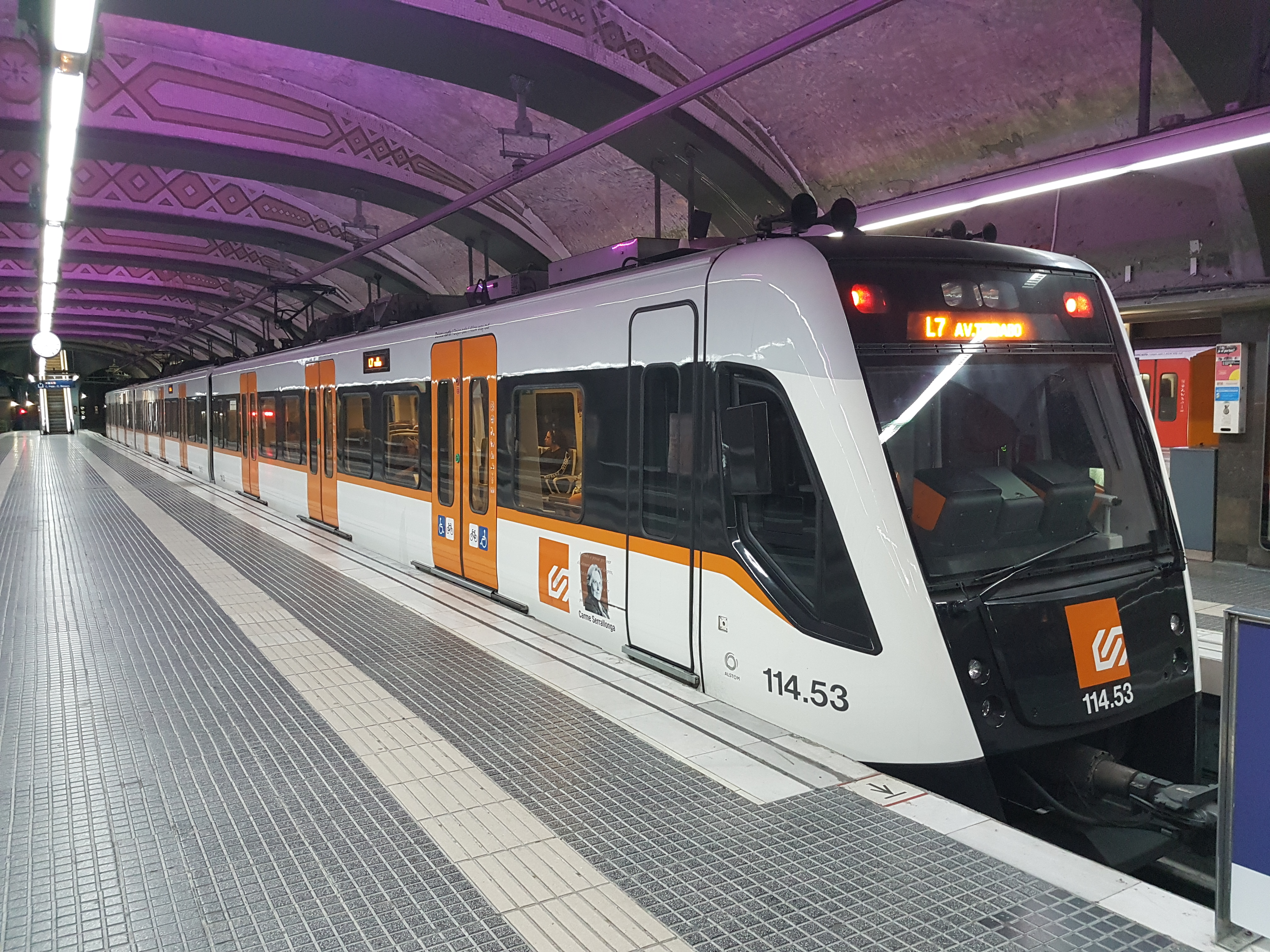 Unitat 114 a l'estació Plaça Catalunya de FGC corresponent a la L7 a punt d'inicar servei cap l'Avinguda Tibidabo.